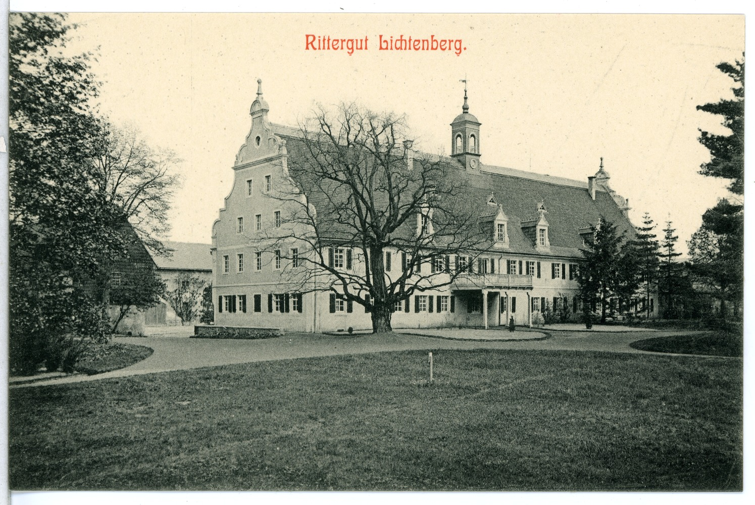 Lichtenberg; Rittergut - Herrenhaus This postcard is from publisher Brück & Sohn in Meißen ( postcard has a unique number 13602 and is available in a higher resolution at the publisher. This images was uploaded in a cooperation project between Wikipedians and the publisher.